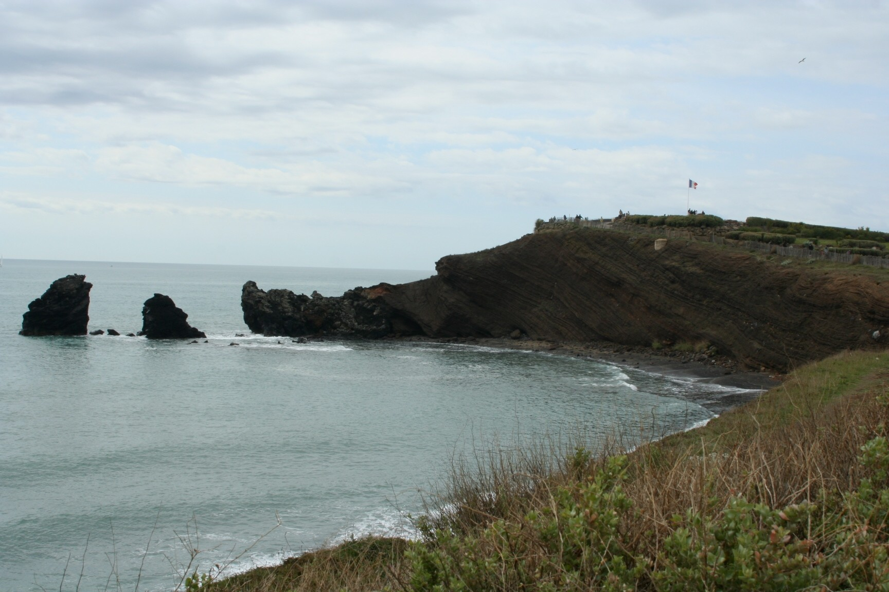 la pointe du cap d'Agde, Hérault. Il s'agit d'un ancien cône volcanique dont la cheminée centrale se trouve à gauche dans la mer ( pointe rocheuse noire) . Le Flanc nord subsiste et constitue, malgré son entaillement par l'érosion, la falaise de la plage ( les pentes du volcans sont visibles). Les éruptions sont de type explosif ( phréato-magmatique).